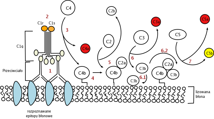 Schemat aktywacji drogi klasycznej dopełniacza, stworzony przez autora artykułu Template:DoSVG